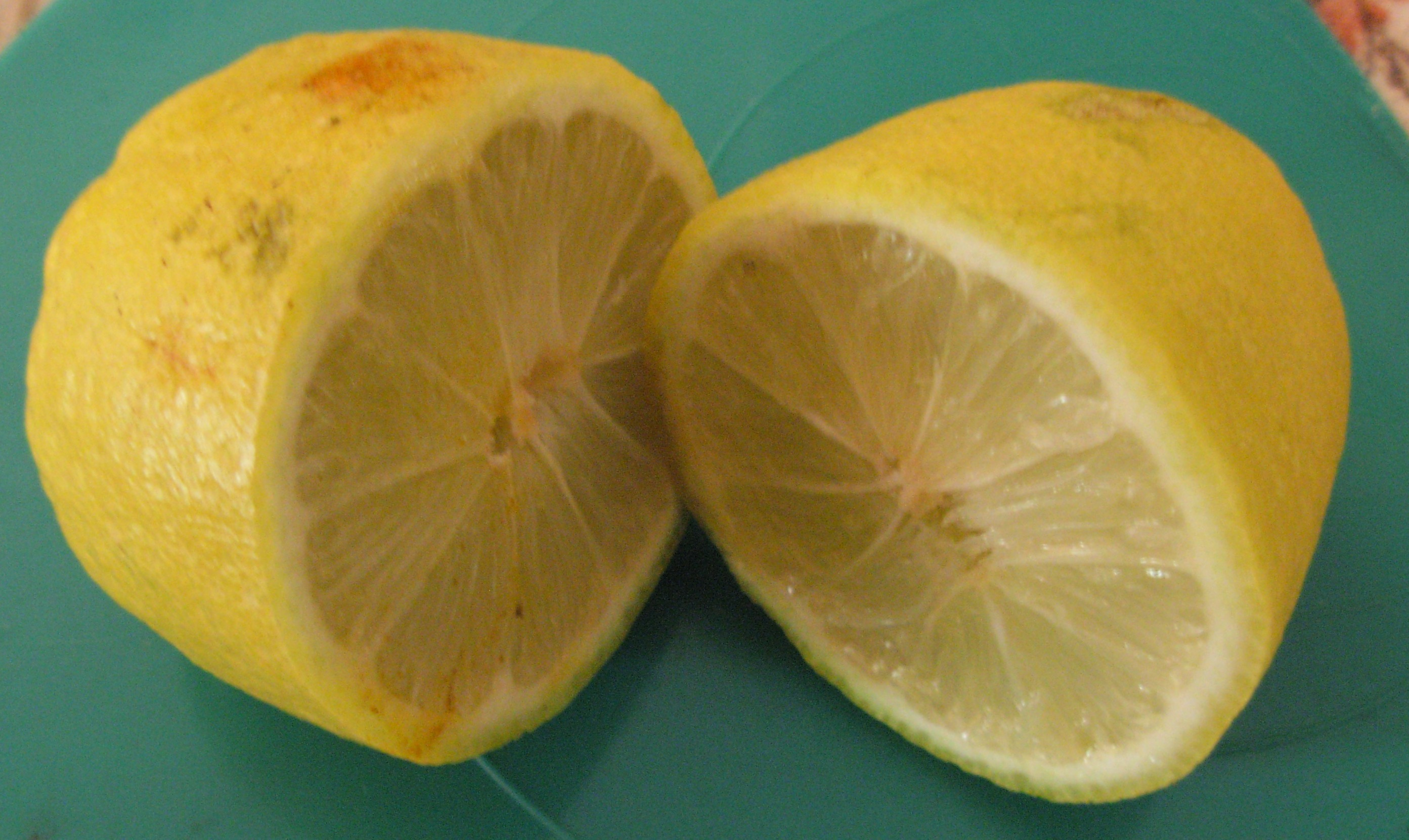 Odichukuthi lime cross section